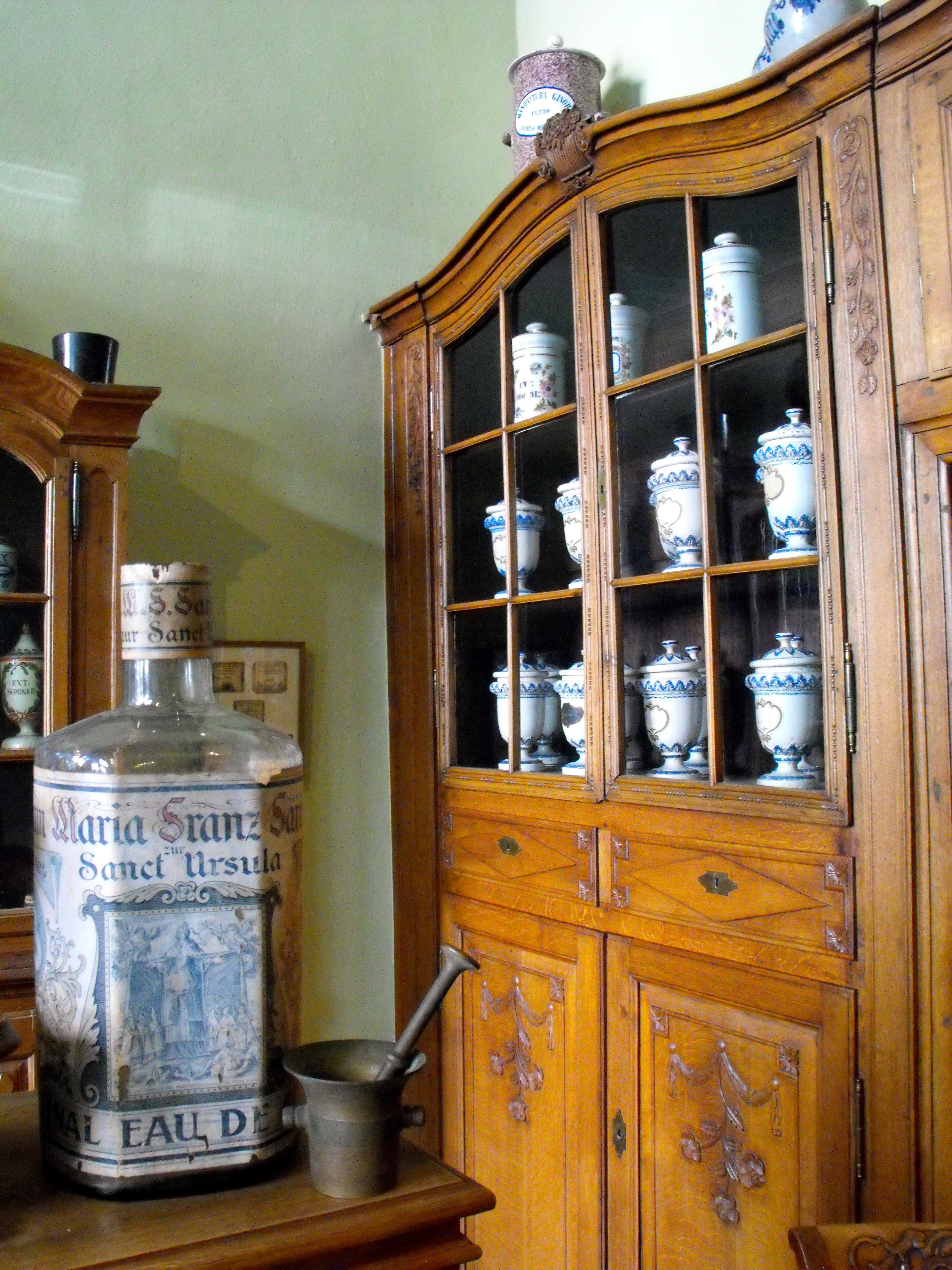 Couven-Museum: Apotheke (Apothekenschrank und Eau de Cologne-Flasche)